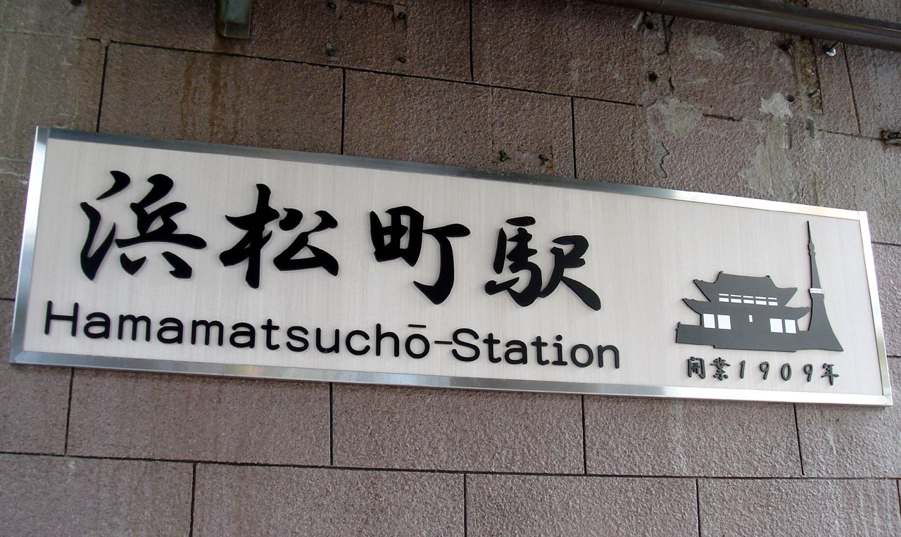 JR浜松町駅の表記 東京タワーと増上寺